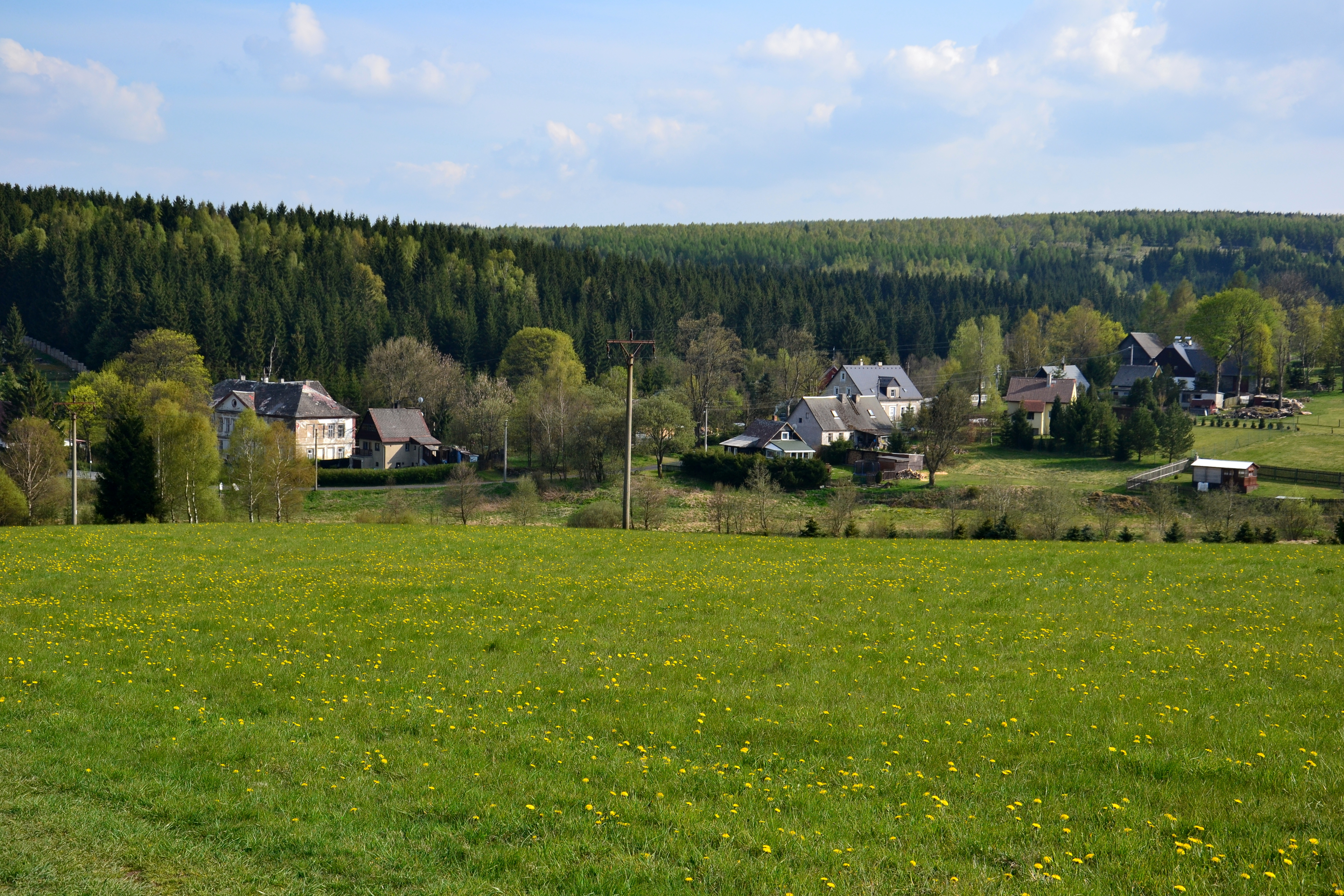 Západní část vesnice